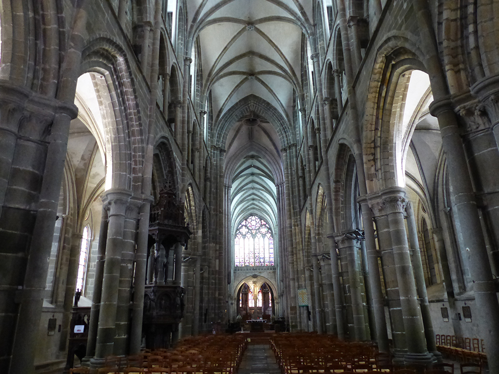 Nef Cathédrale St-Samson Dol de Bretagne